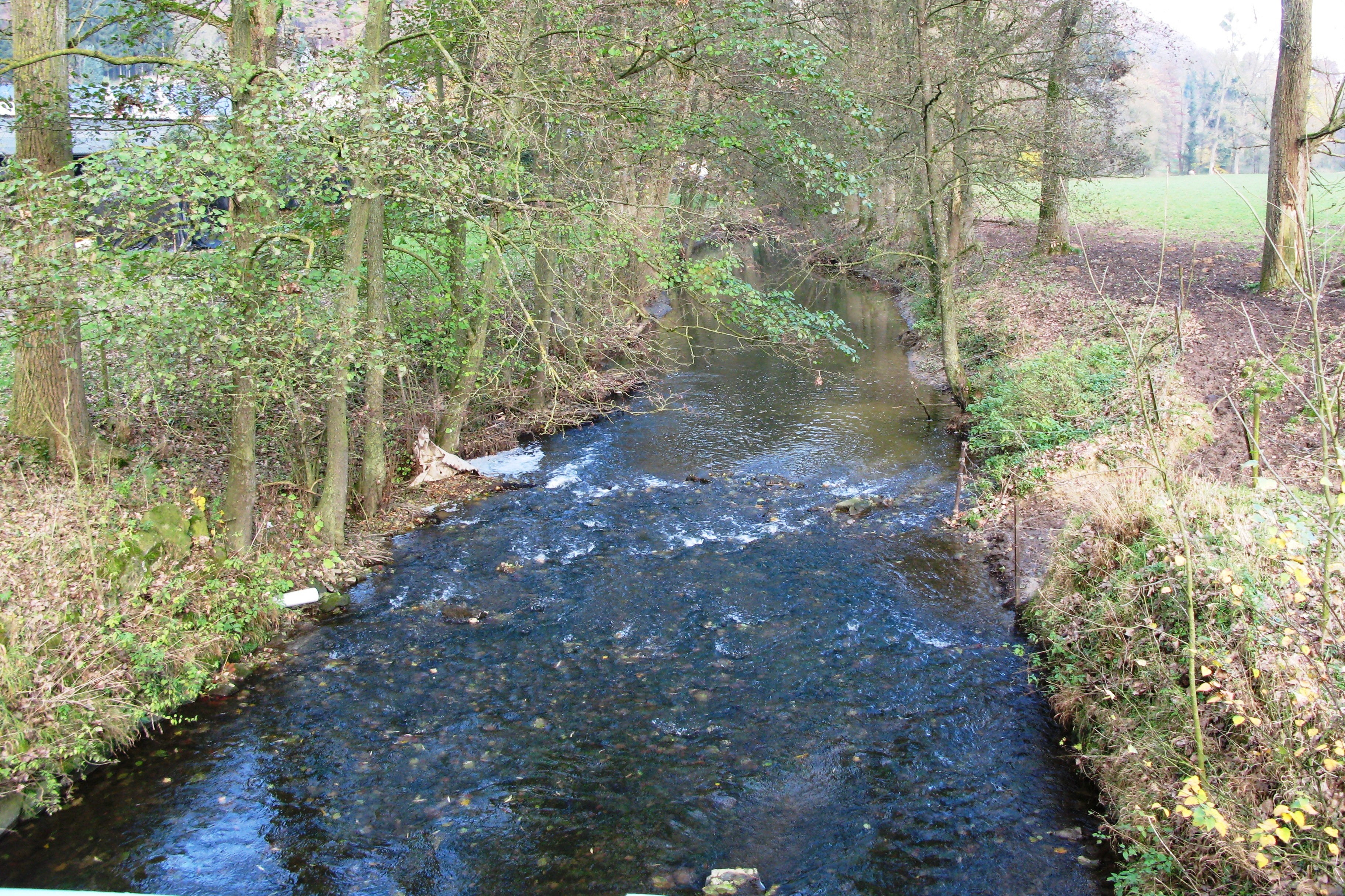 D'Mamer zu Schëndels vun der Bréck aus gesinn déi op d'Schéiferei féiert.